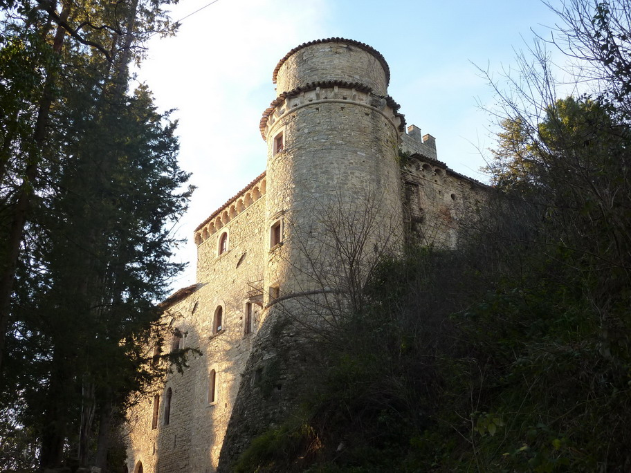 Castello di Carbonana, lato est